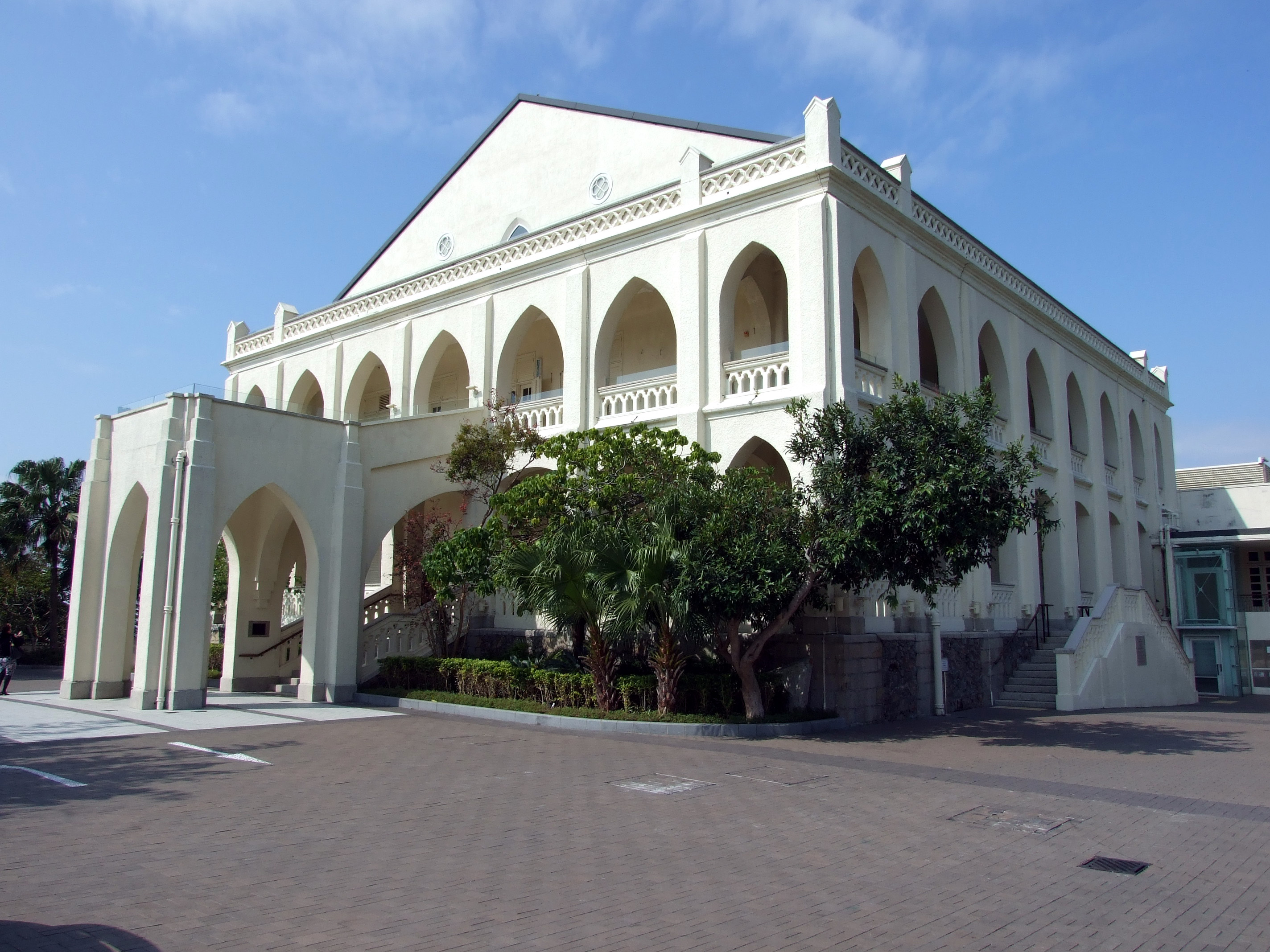 中文（香港）: 伯大尼修院